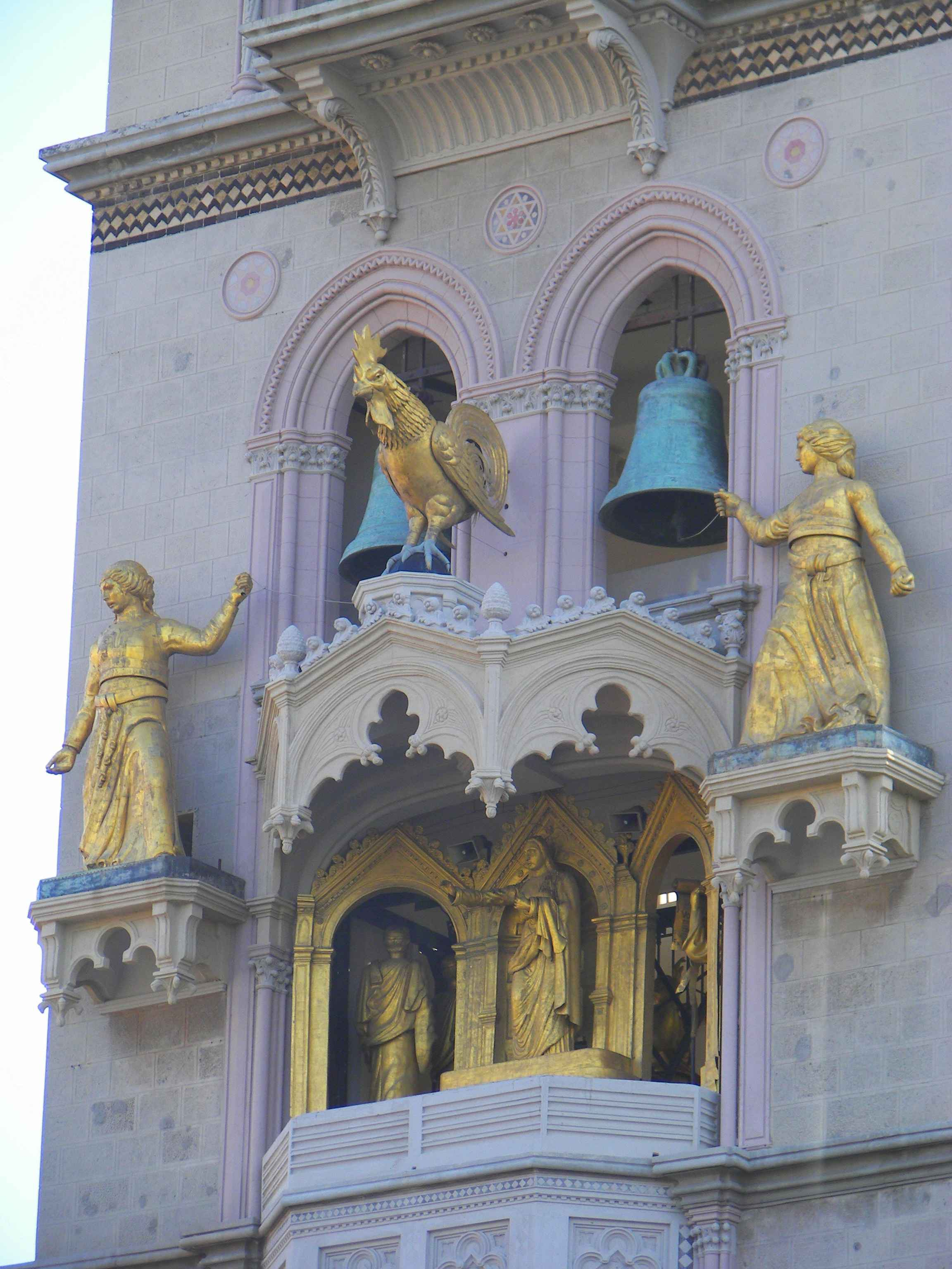 Im Glockenturm neben dem Dom von Messina befindet sich die größte mechanische Uhr der Welt